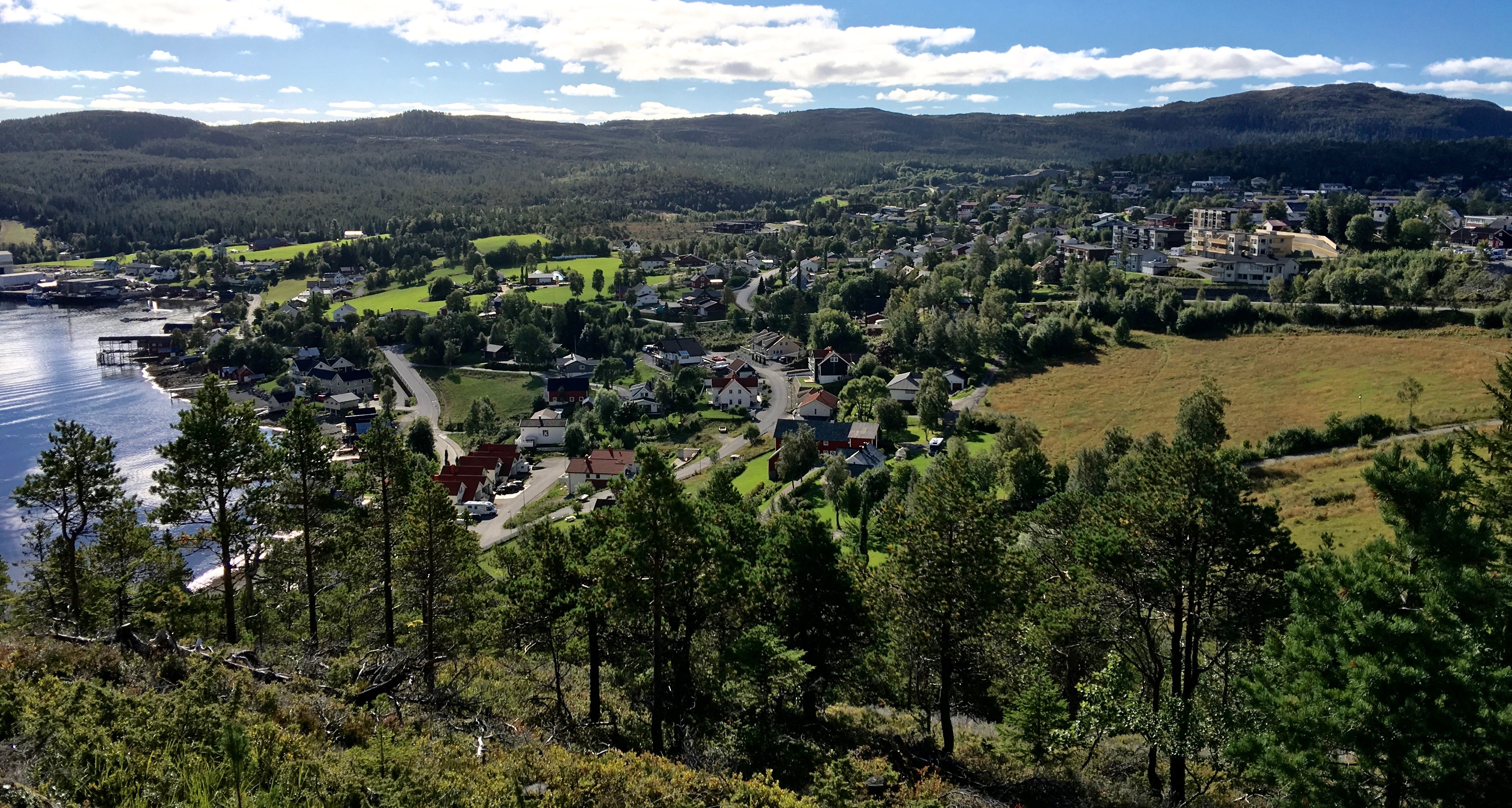 Kolvereid i Nærøy i Nord-Trøndelag 5. september 2016